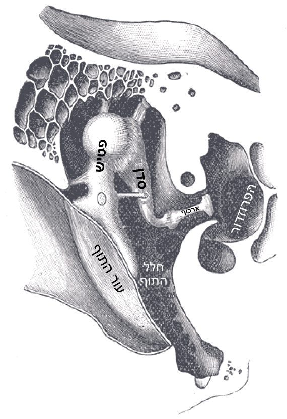 עצמות השמע והרצועות שלהן